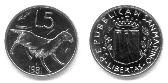 5 san-marinesische Lire, Ausgabe 1981